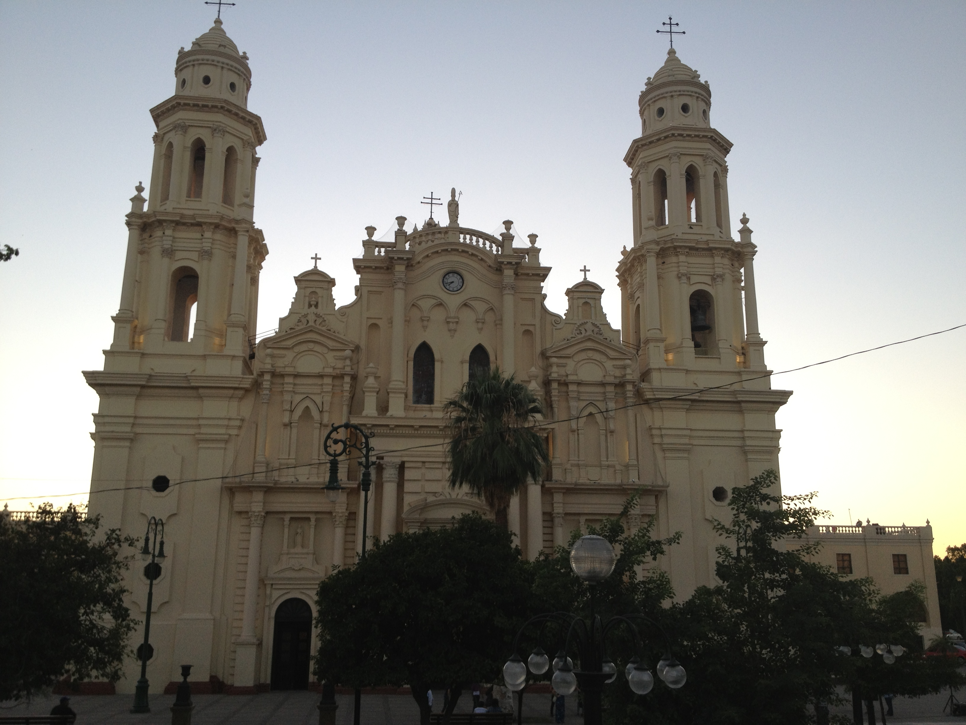 Catedral de Hermosillo, Sonora.